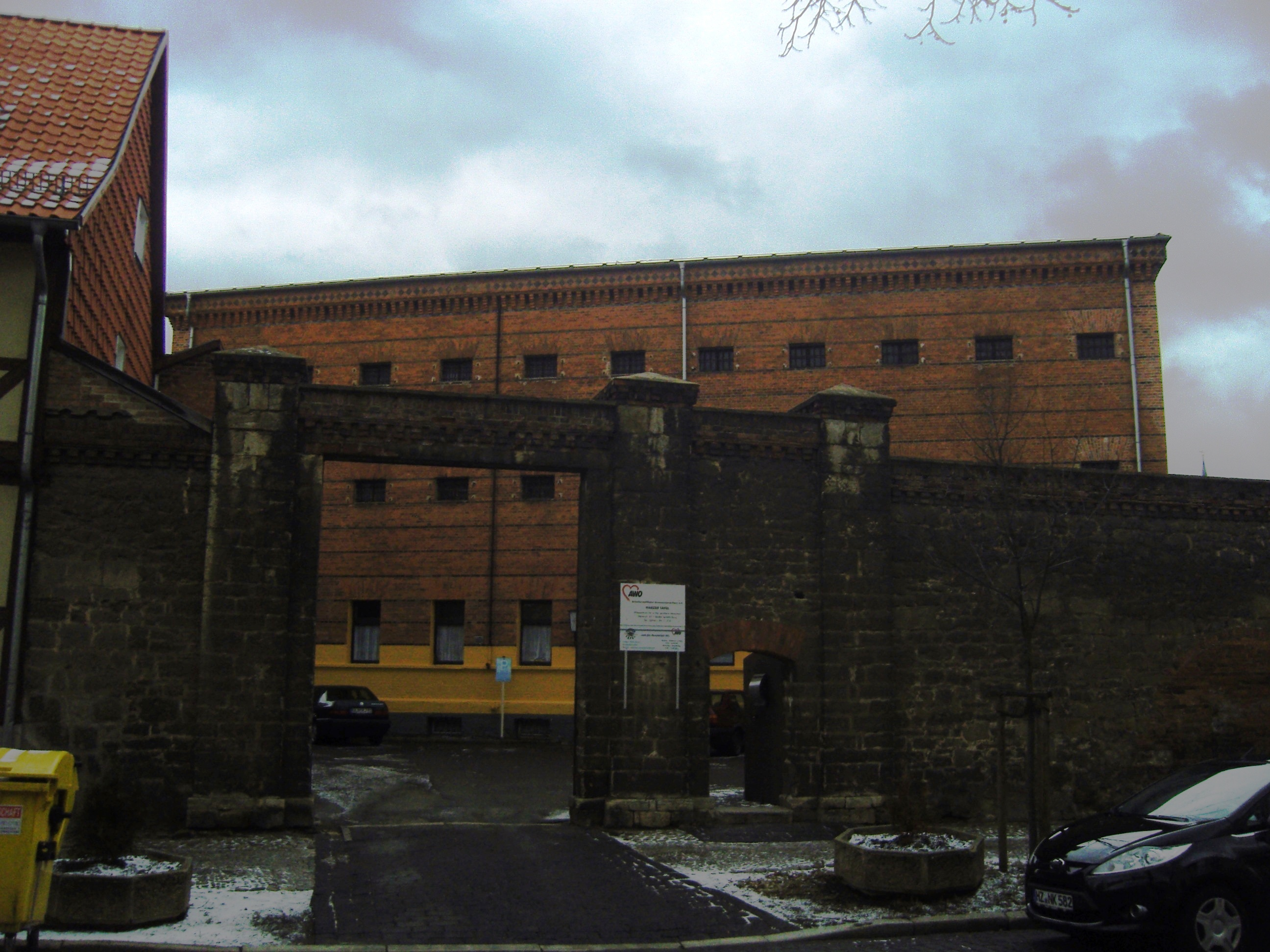 Denkmalgeschütztes Wohnhaus Weberstraße 22 in Quedlinburg